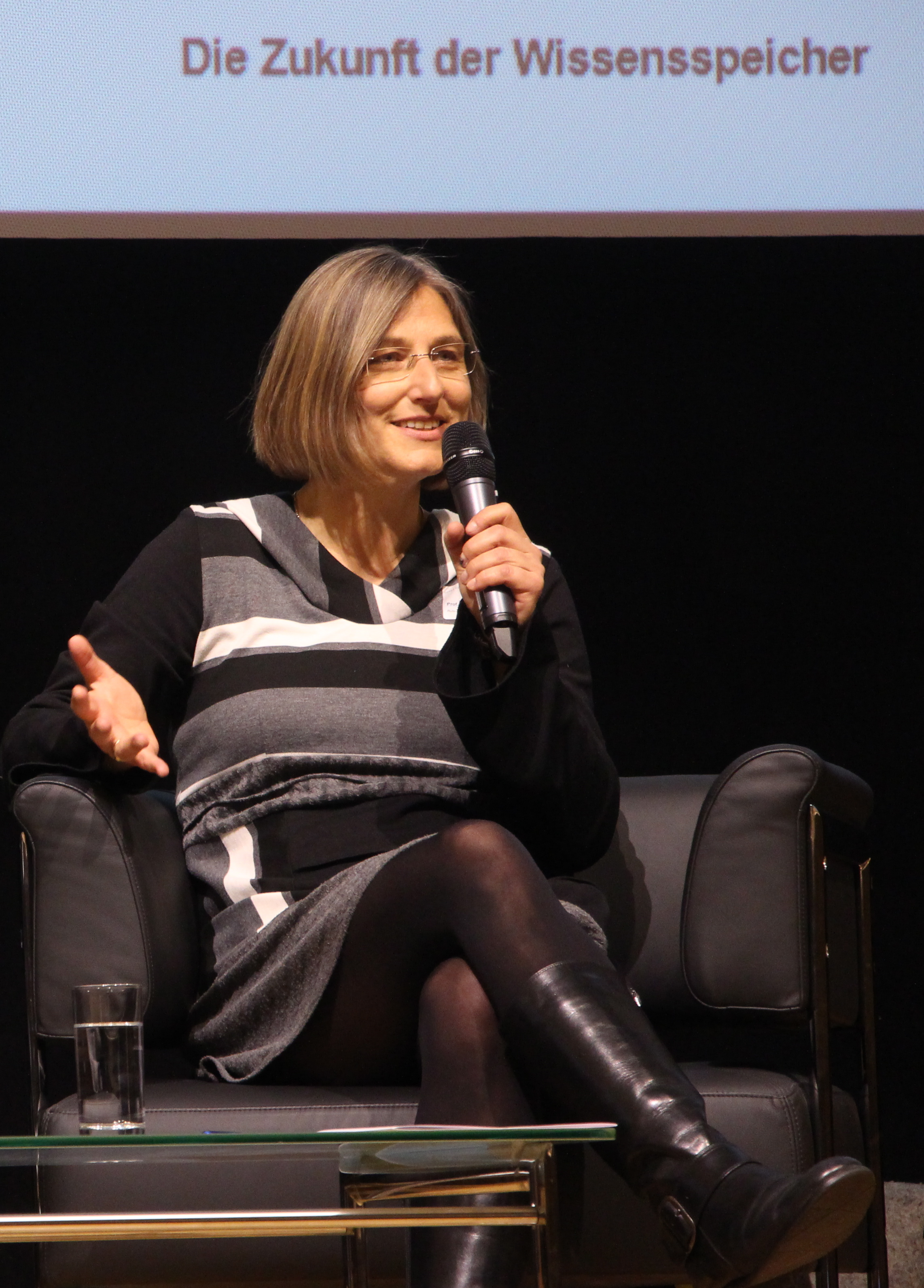 Maren Lorenz auf einer Konferenz in Düsseldorf 2015